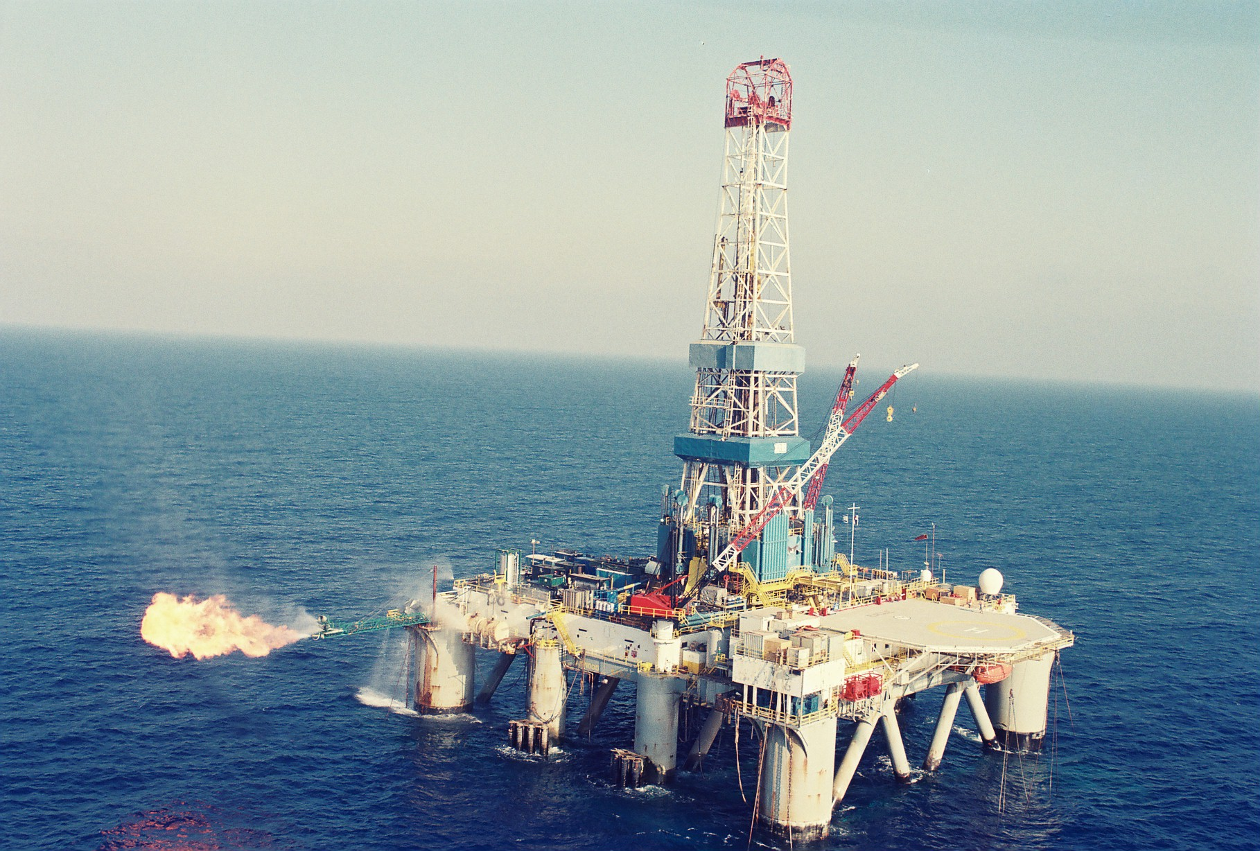 ראשון מגדלי הקידוח בשדה הגז נועה בישראל